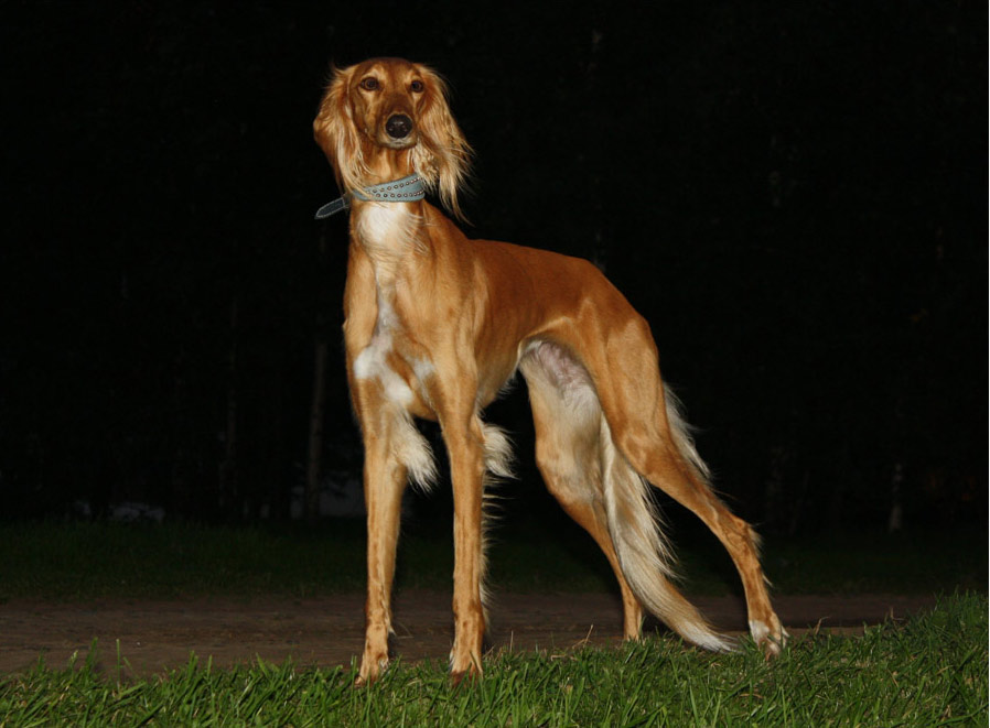 Цезарии 18 месяцев.